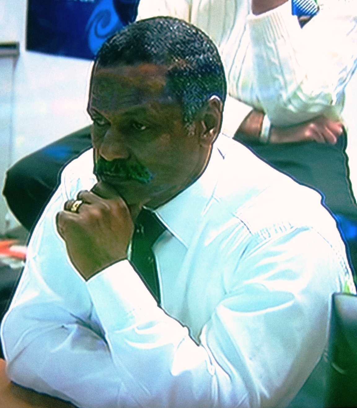 Le sélectionneur sud africain Peter de Villiers en 2011